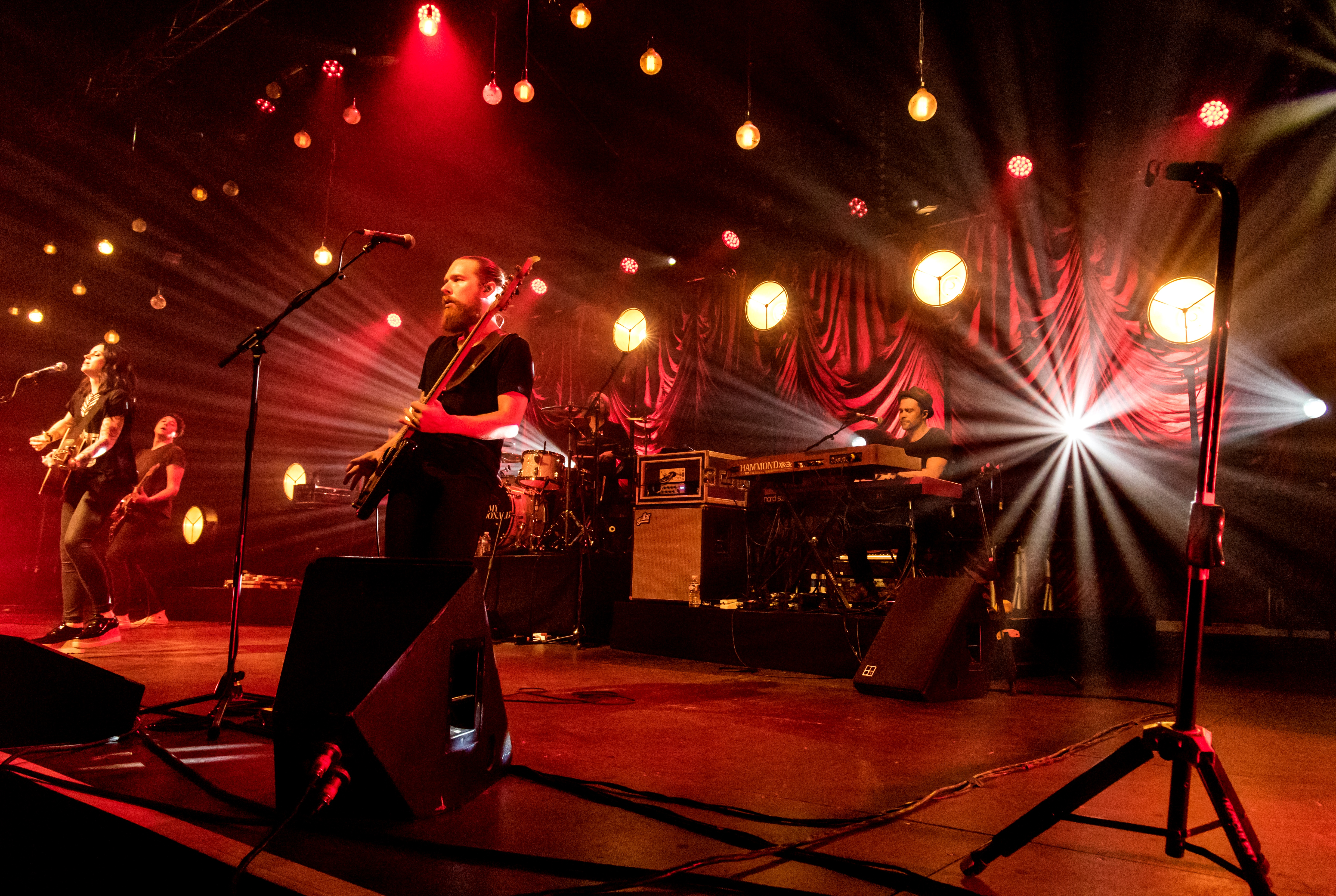 Bilder vom Zelt Musik Festival 2017 in Freiburg im Breisgau